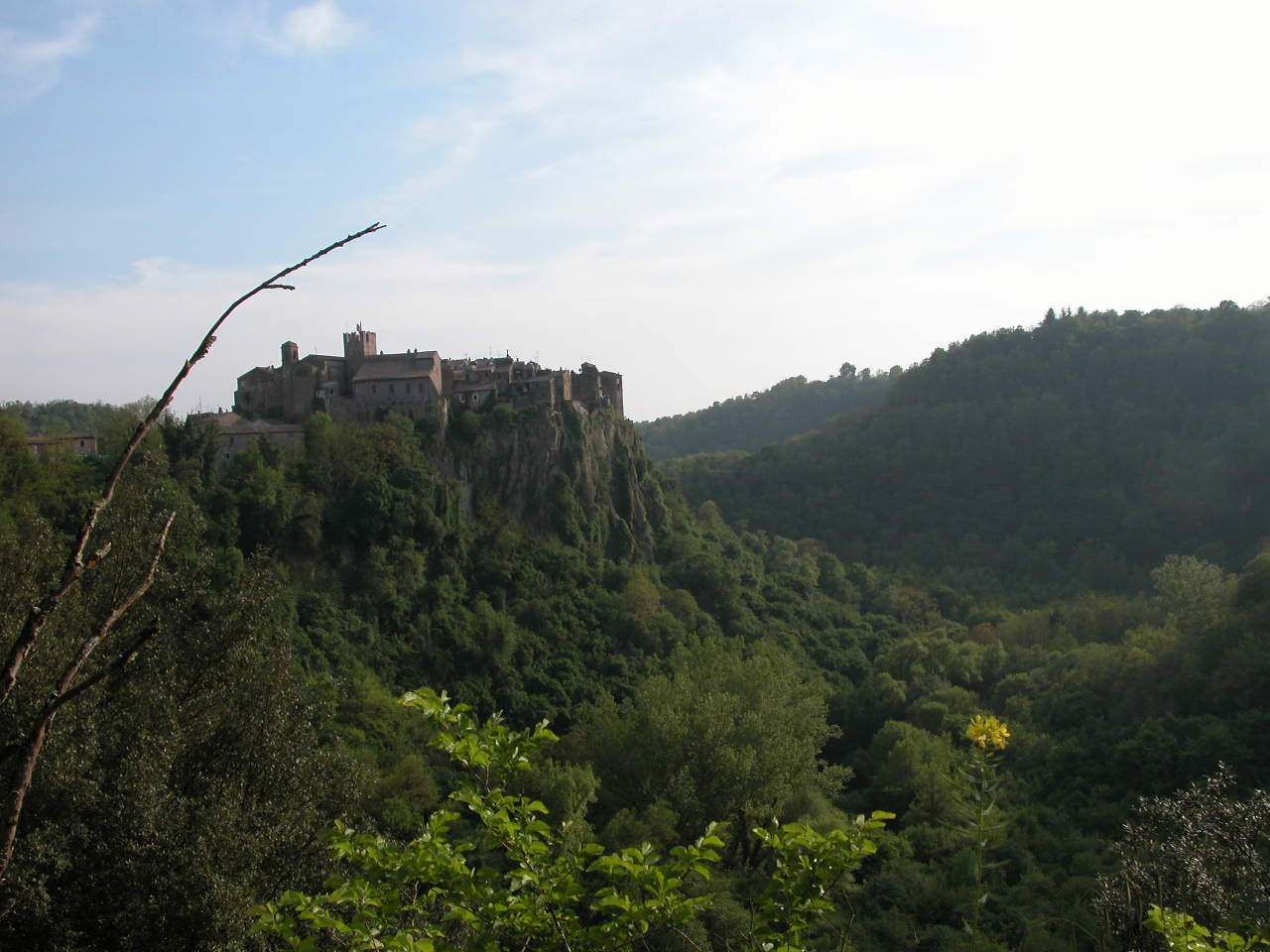 Monica Carcangiu, Calcata e la valle del Treja, panorama